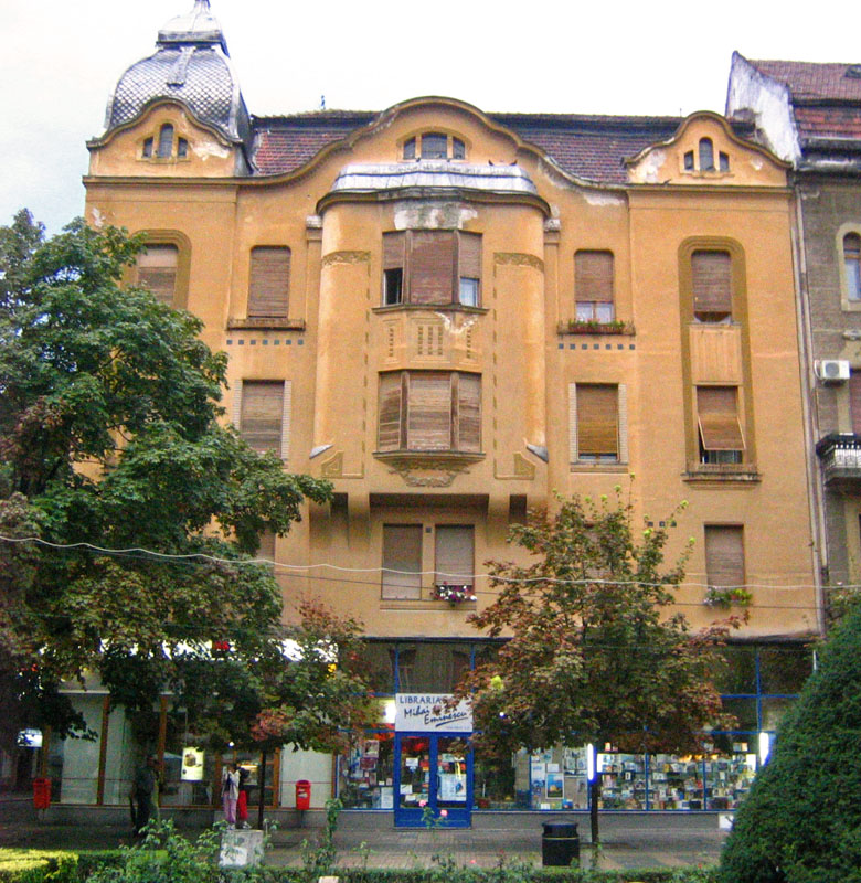 Palatul_Merbl (Timişoara).